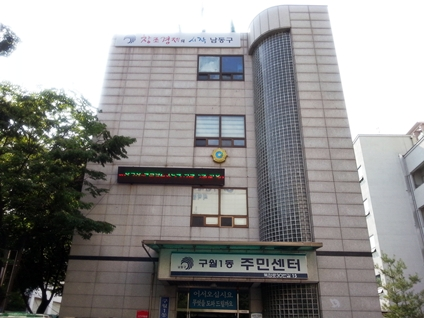 구월1동 주민센터 (인천광역시 남동구 독점로30번길 15 구월1동주민센터 (인천광역시 남동구 구월1동 1214-5))